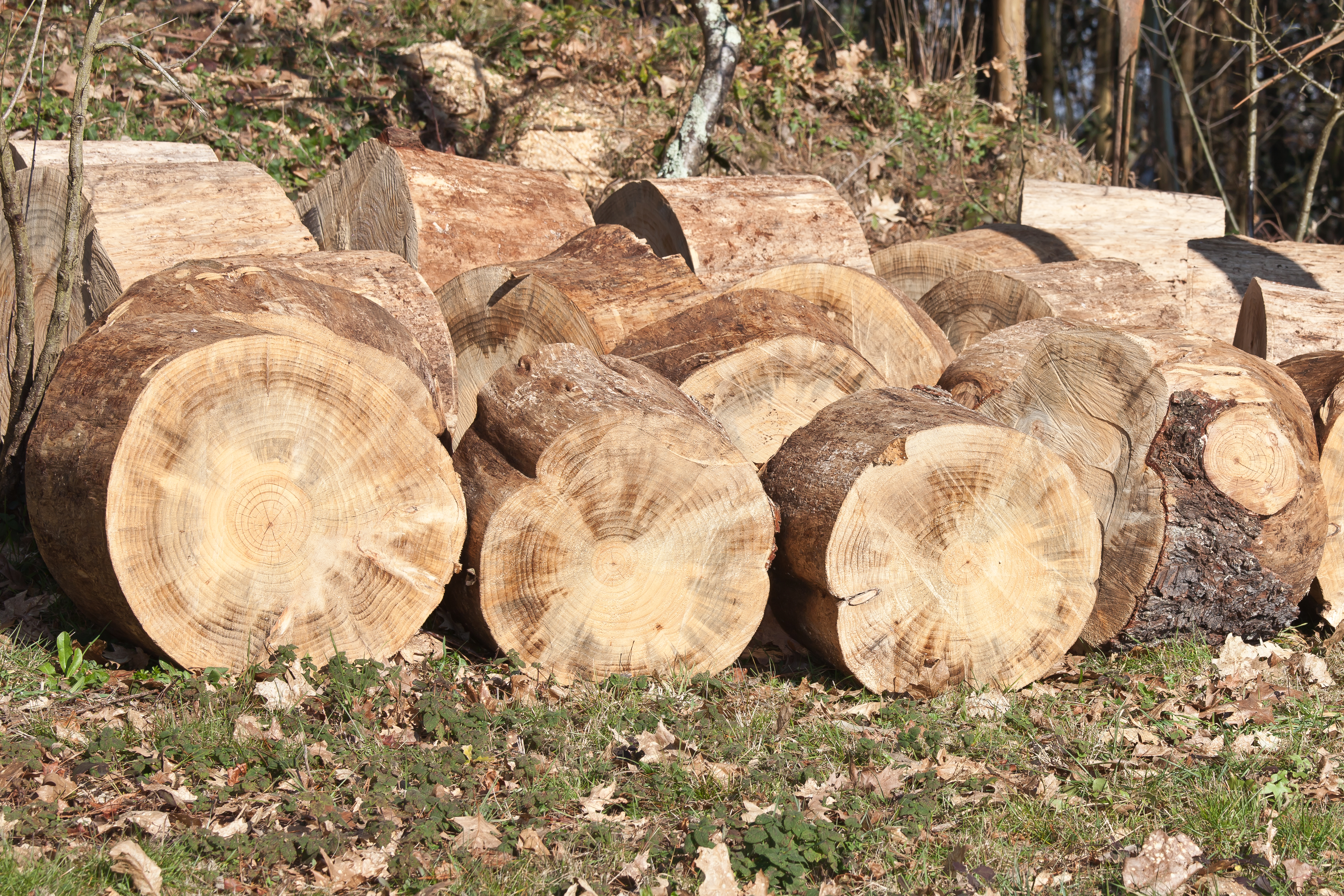 Toras de madeira e eucalipto. Vilarromarís, Oroso, Galiza